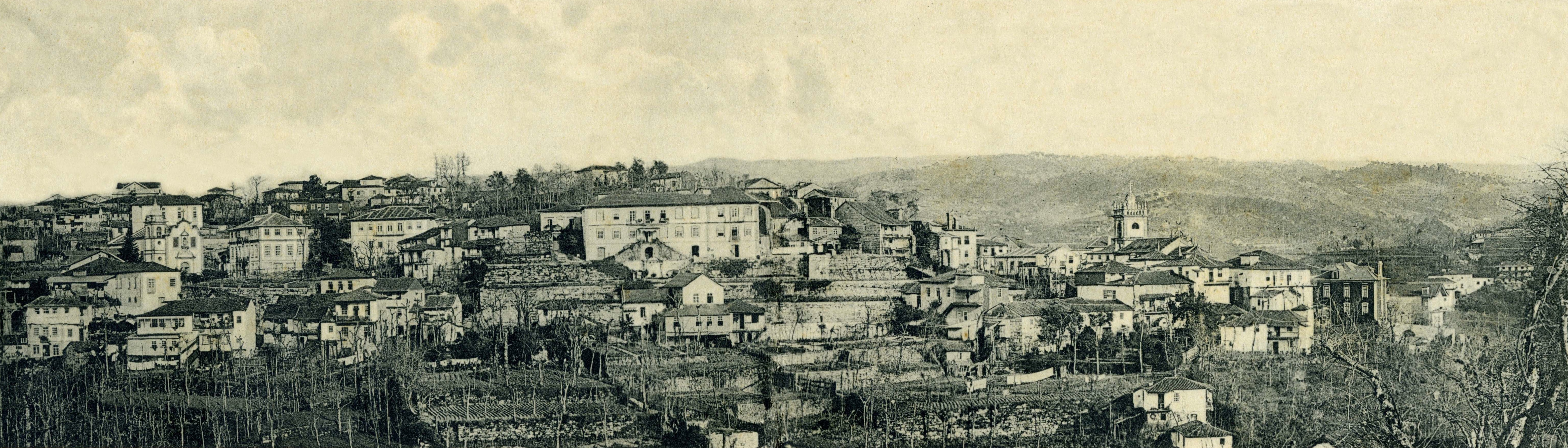 Vue générale de la ville d'Amarante, au Portugal.